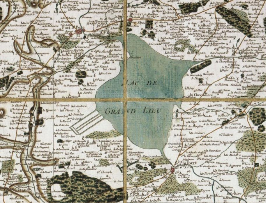 Partie de la carte générale de la France. [Nantes]. N°131. Feuille 168